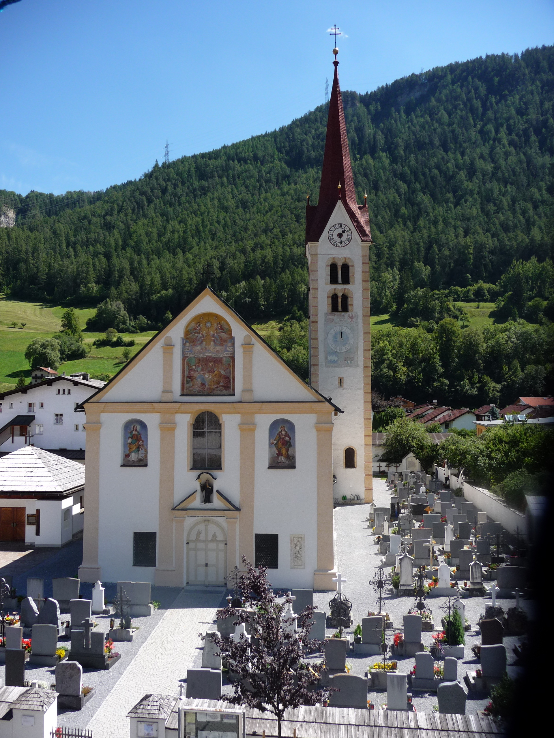 Kath. Pfarrkirche hl. Leonhard